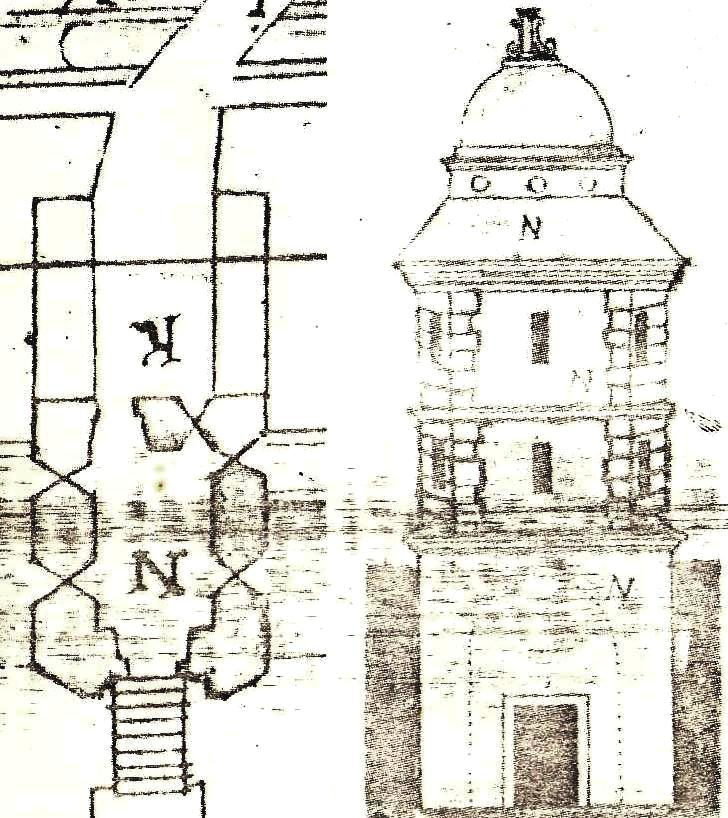 зображення зовнішньої частини єзутської хвіртки Львова: схеми 1647 року